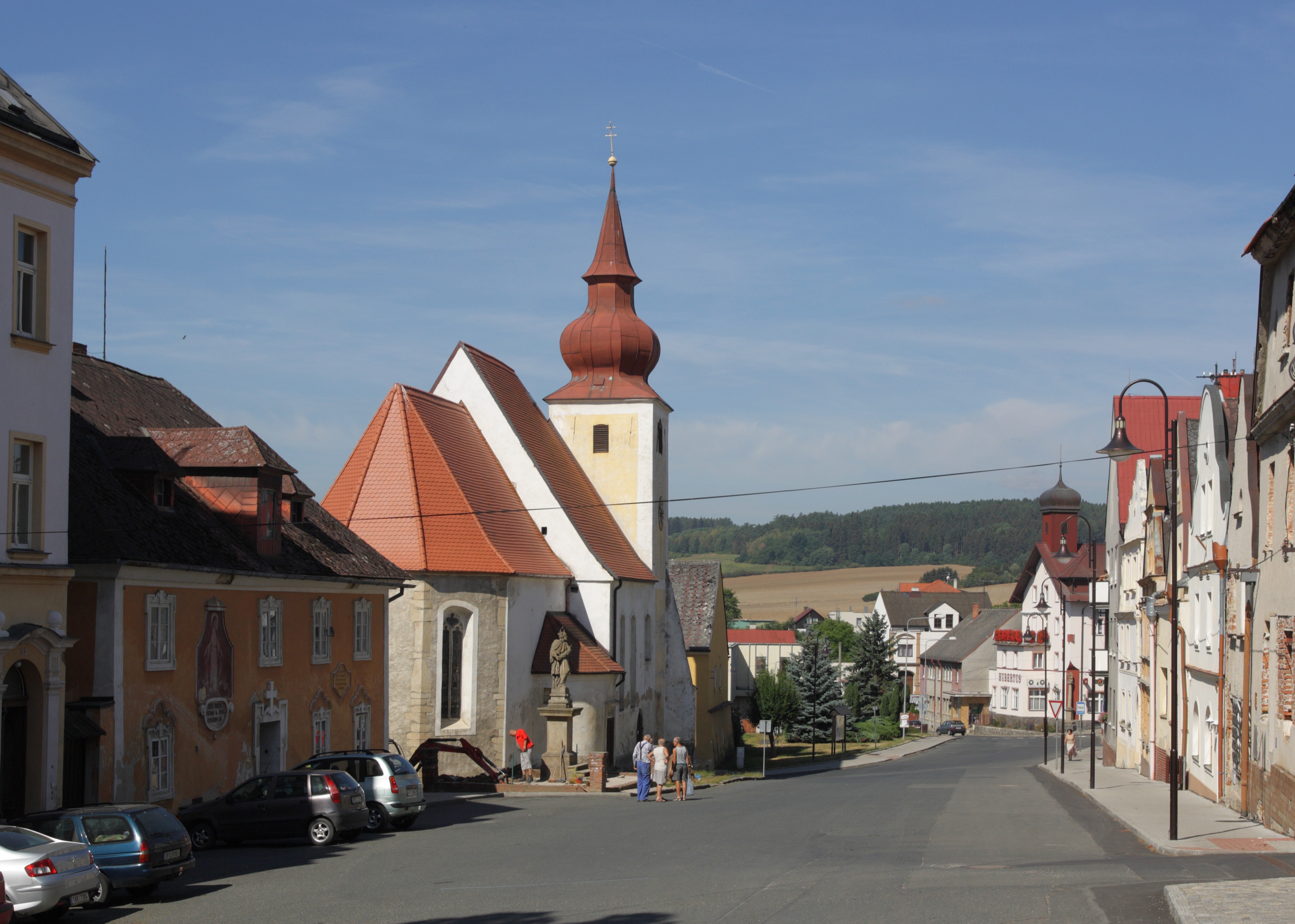 Poběžovice - náměstí Míru.